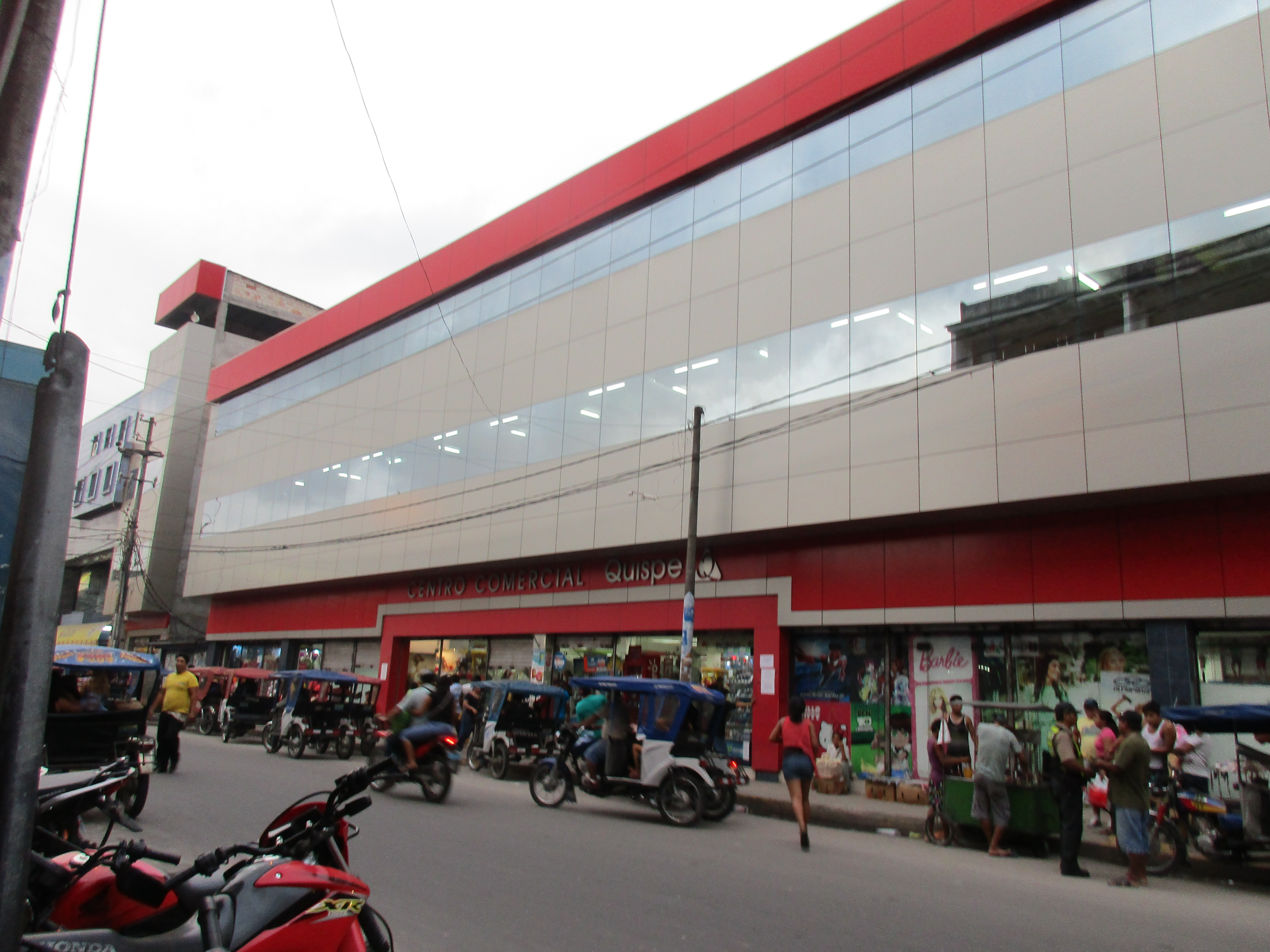 El Centro comercial Galerías Quispes en Iquitos.